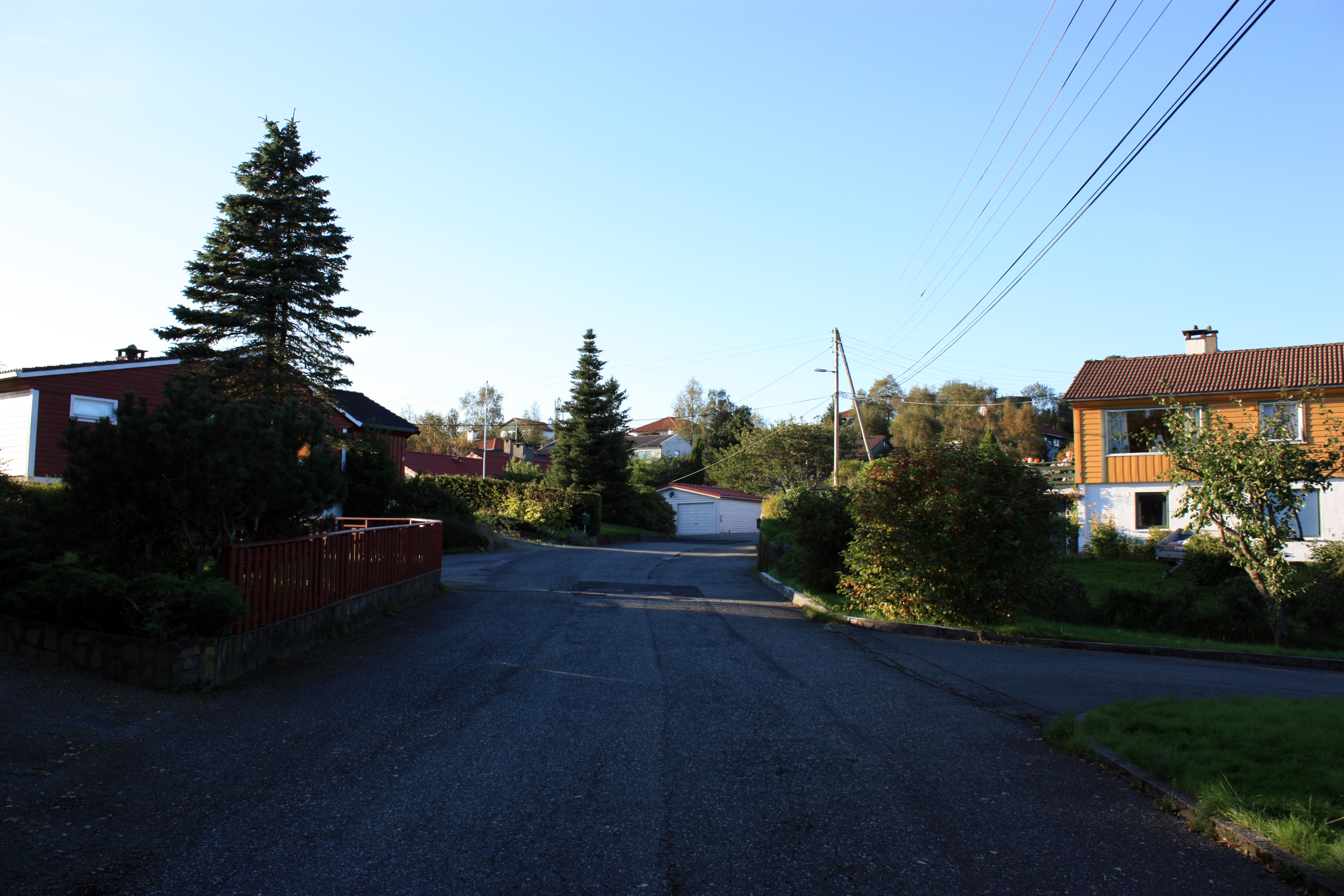 Austlia, Fana, Bergen.